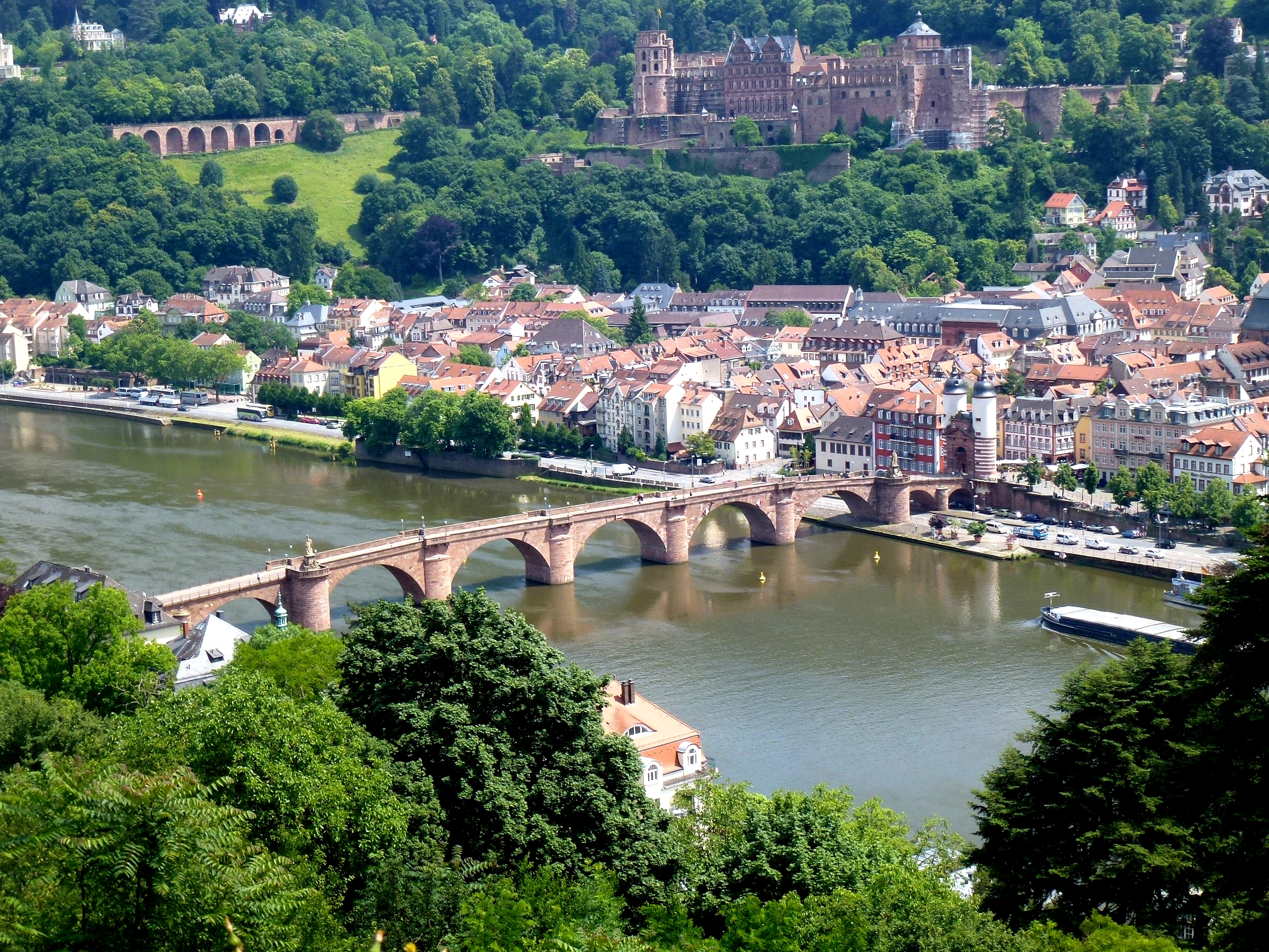 Alte Brücke Schloss Philosophenweg Heidelberg Germany